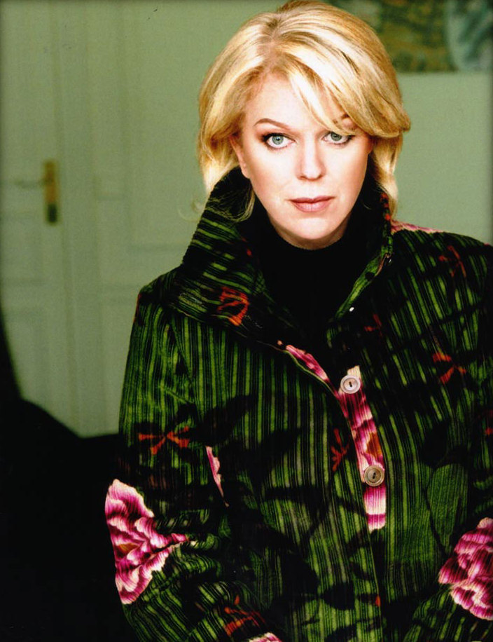 La chanteuse de jazz française Anne Ducros